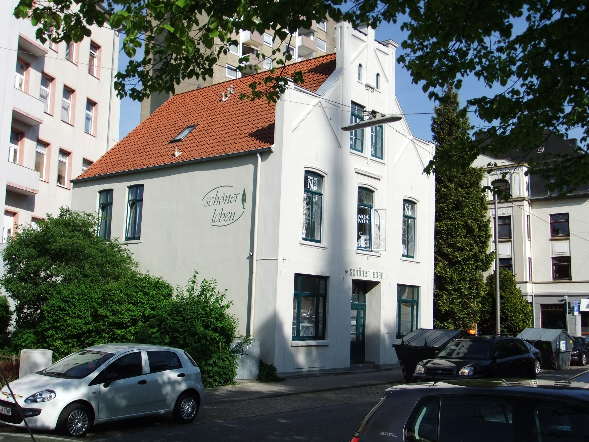 Wohnhaus in Bremerhaven, Prager Straße 53. Das abgebildete Objekt ist ein geschütztes Kulturdenkmal in der Freien Hansestadt Bremen, mit der Nr. 1549 beim Landesamt für Denkmalpflege registriert.